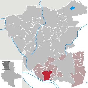 Mieste im Altmarkkreis Salzwedel